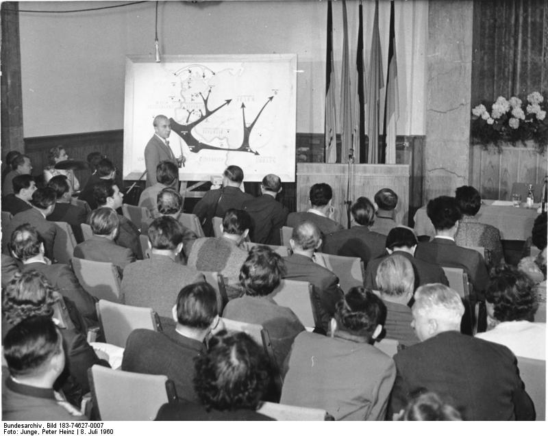 Berlin, Pressekonferenz Major Bruno Winzer Zentralbild/Junge, 8.7.1960 Internationale Pressekonferenz des Ausschusses für Deutsche Einheit; Bundeswehr-Major Bruno Winzer gab Erklärungen ab. Aufschlußreiche Enthüllungen über den agressiven, faschistischen Charakter der Bonner Bundeswehr unterbreitete am 8.7.1960 auf einer internatinoalen Pressekonferenz des Ausschusses für Deutsche Einheit der in die DDR geflüchtete Major der Bundeswehr Bruno Winzer der Öffentlichkeit. In einer Erklärung stellte er fest, dass ihn die zunehmende Faschisierung der Bundeswehr und des gesamten Bonner Staatsapparates bewogen hat, der Bundesrepublik den Rücken zu kehren. UBz: Während der Pressekonferenz. An der Karte erklärt Bruno Winzer den Plan Bonns zum Überfall auf sozialistische Staaten und Österreich. Abgebildete Personen: Winzer, Bruno: Major der Bundeswehr, 1960 in die DDR übergesiedelt, (PND 118633899)